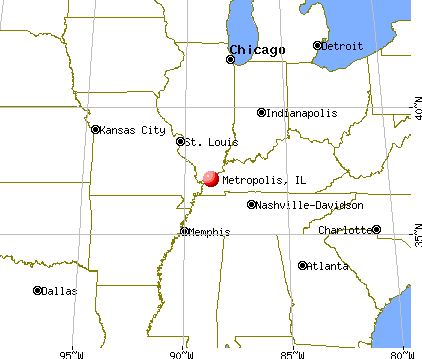 Localisation de Métropolis